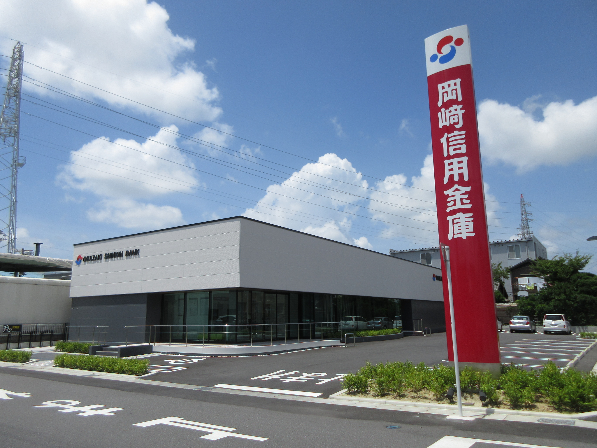 岡崎信用金庫 日名支店（岡崎市井田西町）